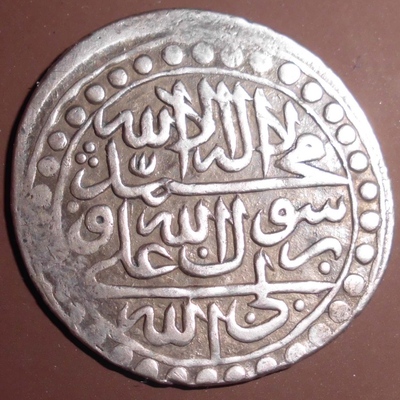 Султан Хусейн I, аббаси, тип D - третий стандарт, вес 5,4 г, Ереван, 1131 год хиджры. Реверс